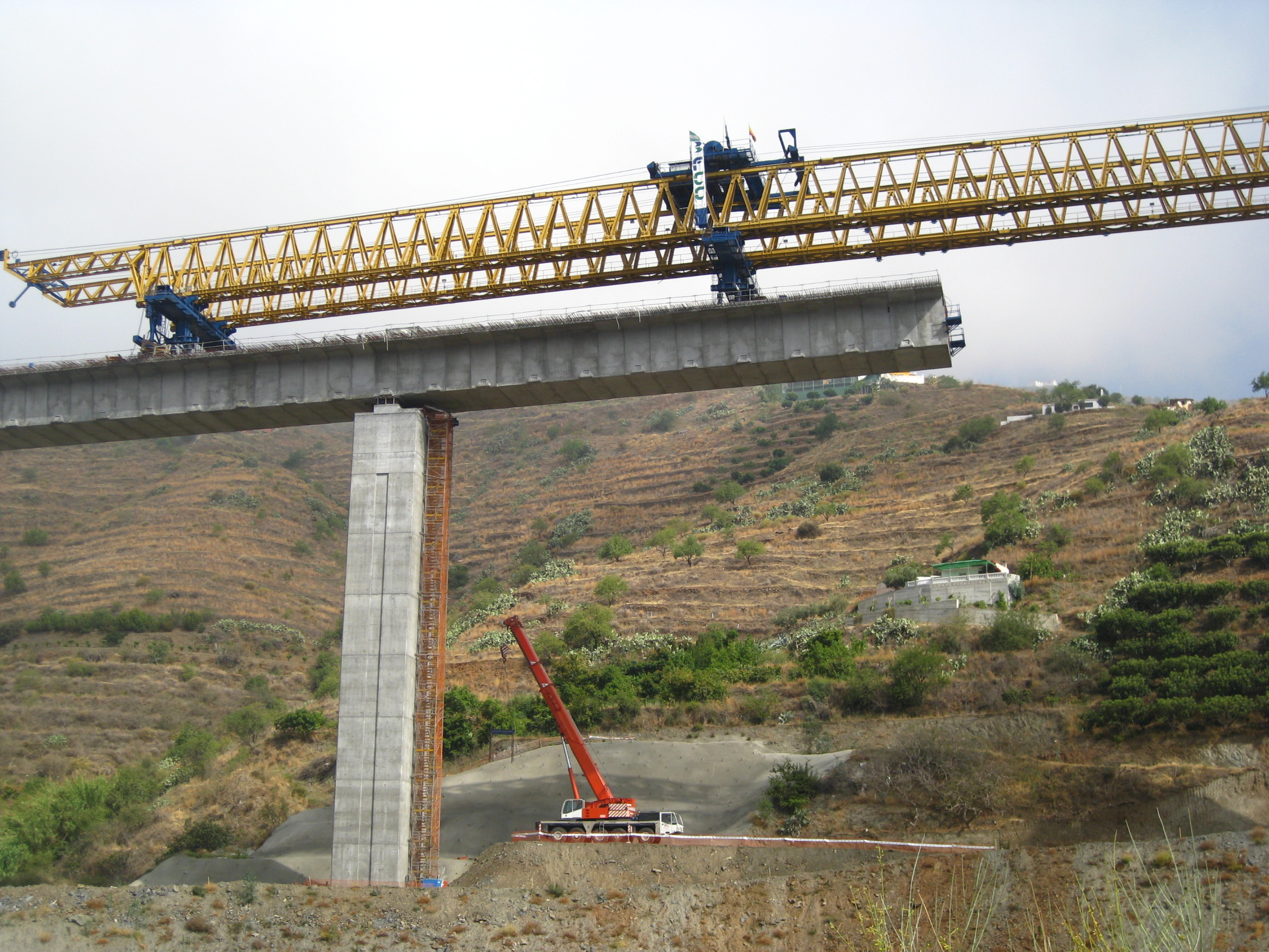 Viaducto en construcción para la A-7. Viaducto de Taramay. Junio de 2012